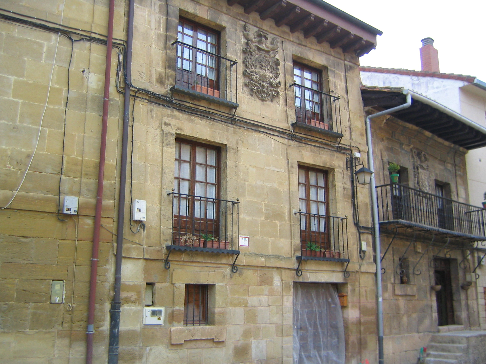 Calle Mayor de la localidad de Salinillas de Buradón, en el municipio de Labastida (Álava, España).